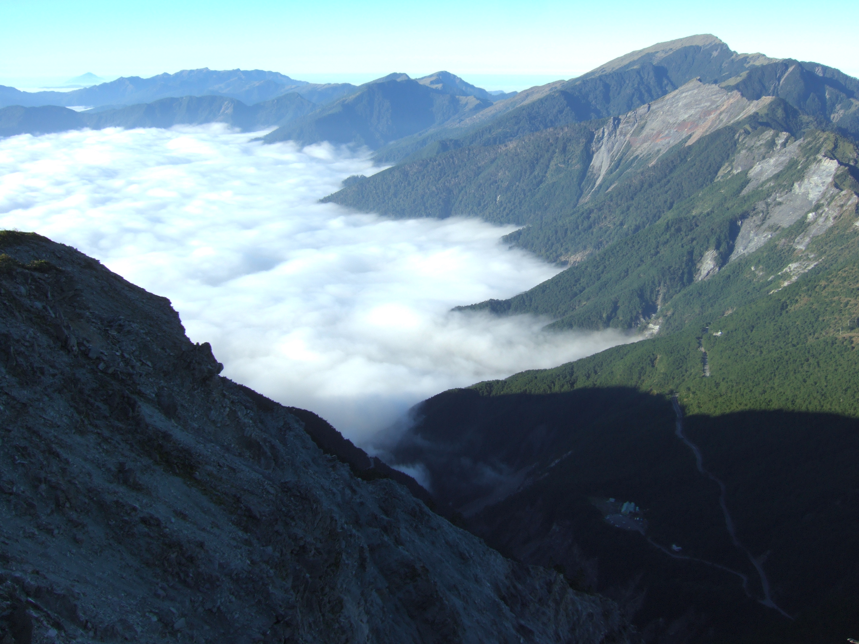 向阳山